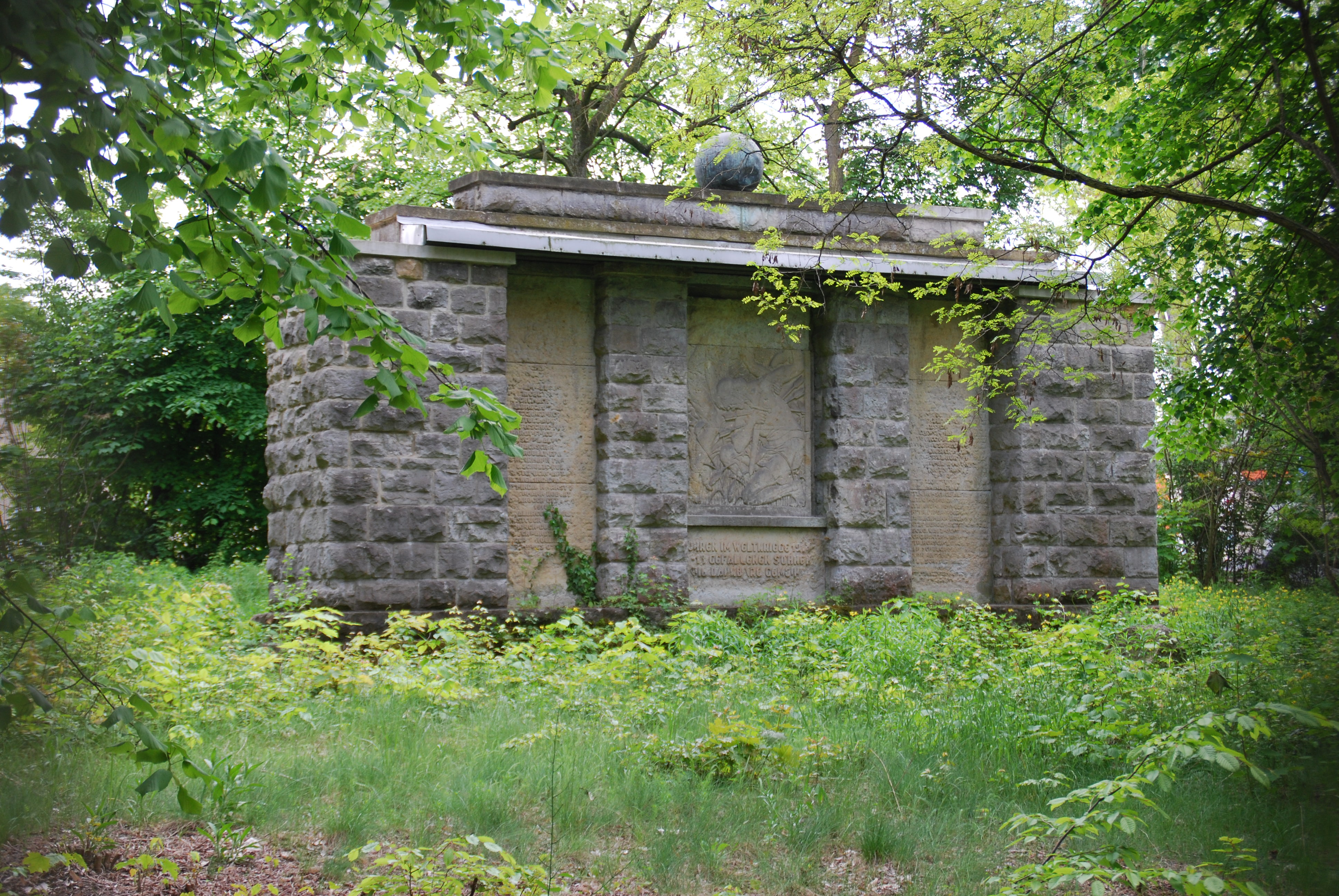 Kriegerdenkmal („Fidus-Denkmal“) für die Gefallenen Woltersdorfer des Ersten Weltkrieges in Woltersdorf